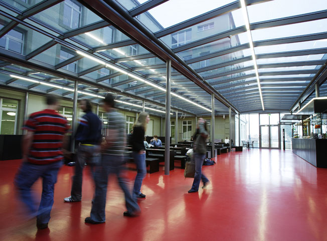 Studierende im Foyer des Unigebäudes UniS der Universität Bern